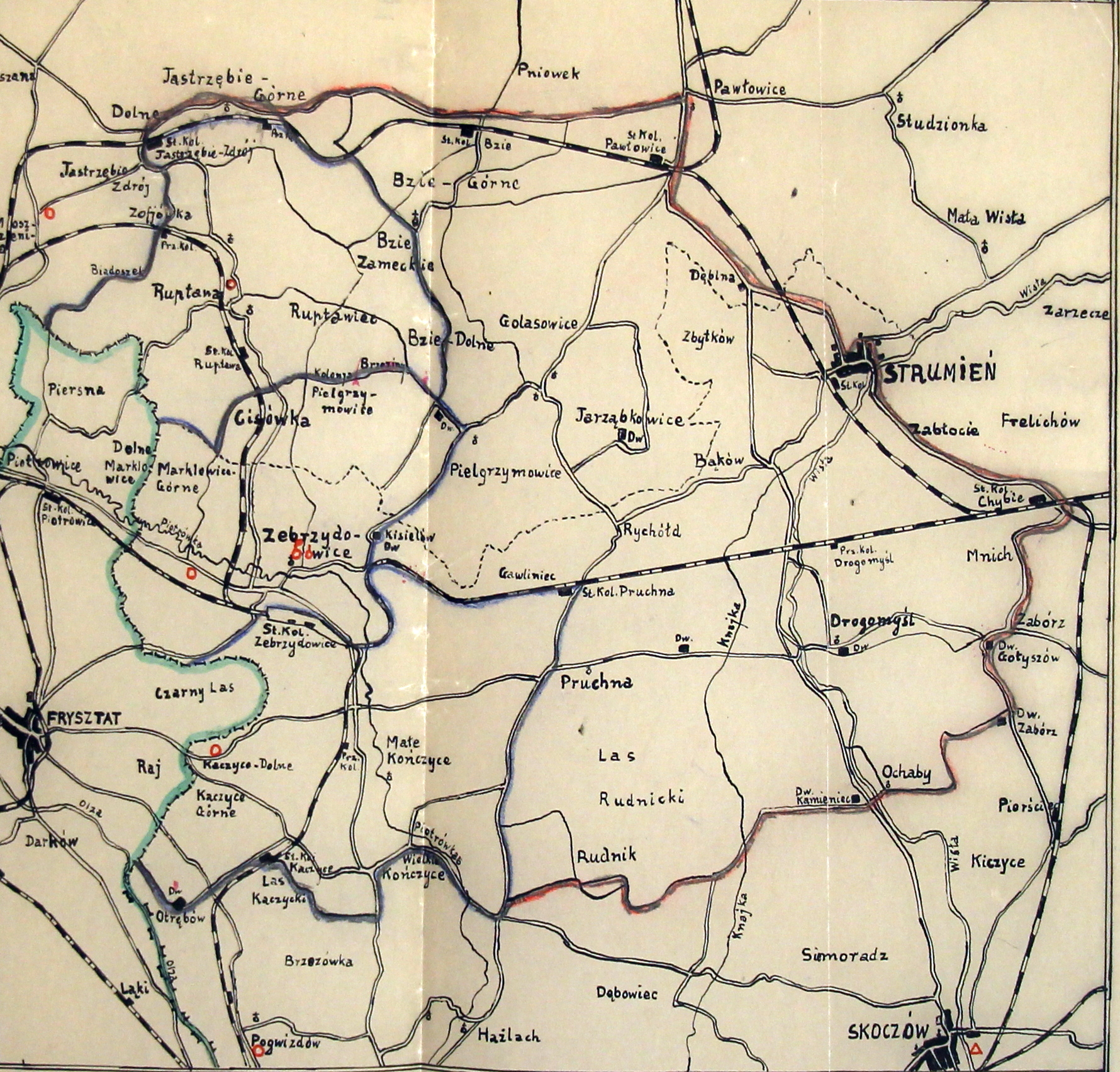 Szkic komisariatu SG Zebrzydowice - lata 30. XX wieku